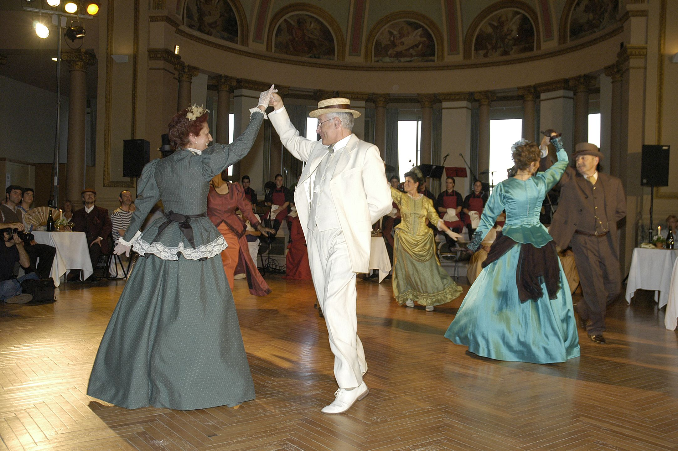 Activitat Ball al Casino. Fira Modernista